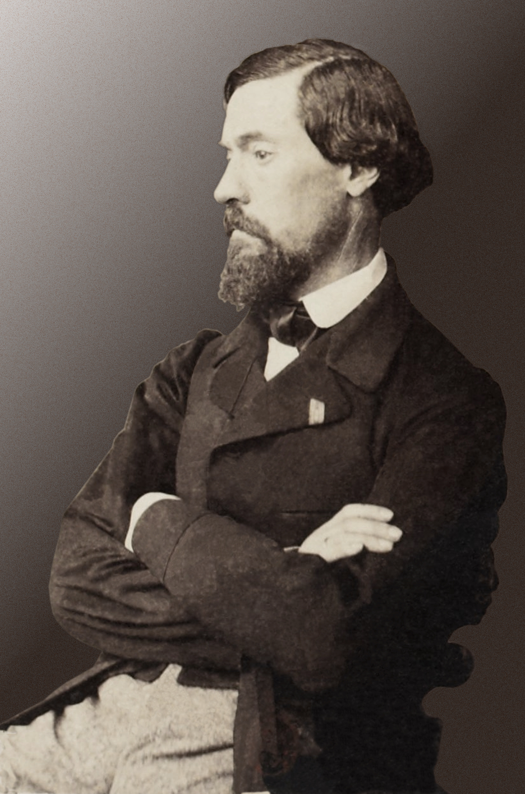 Pierre-Michel-François Chevalier, dit Pitre-Chevalier (1812 - 1863), auteur, historien et journaliste français.